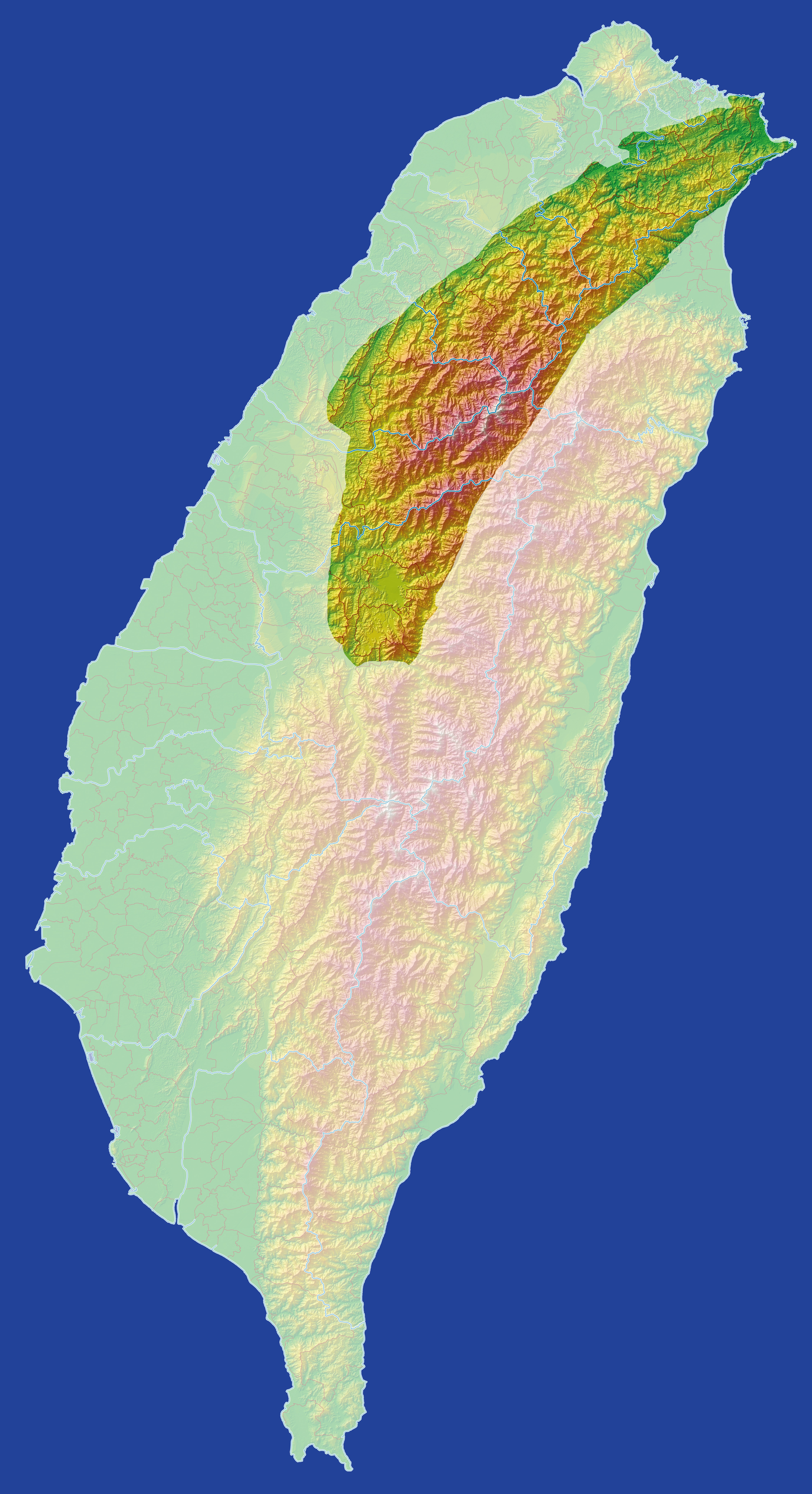 Map of Xueshan Range, Taiwan